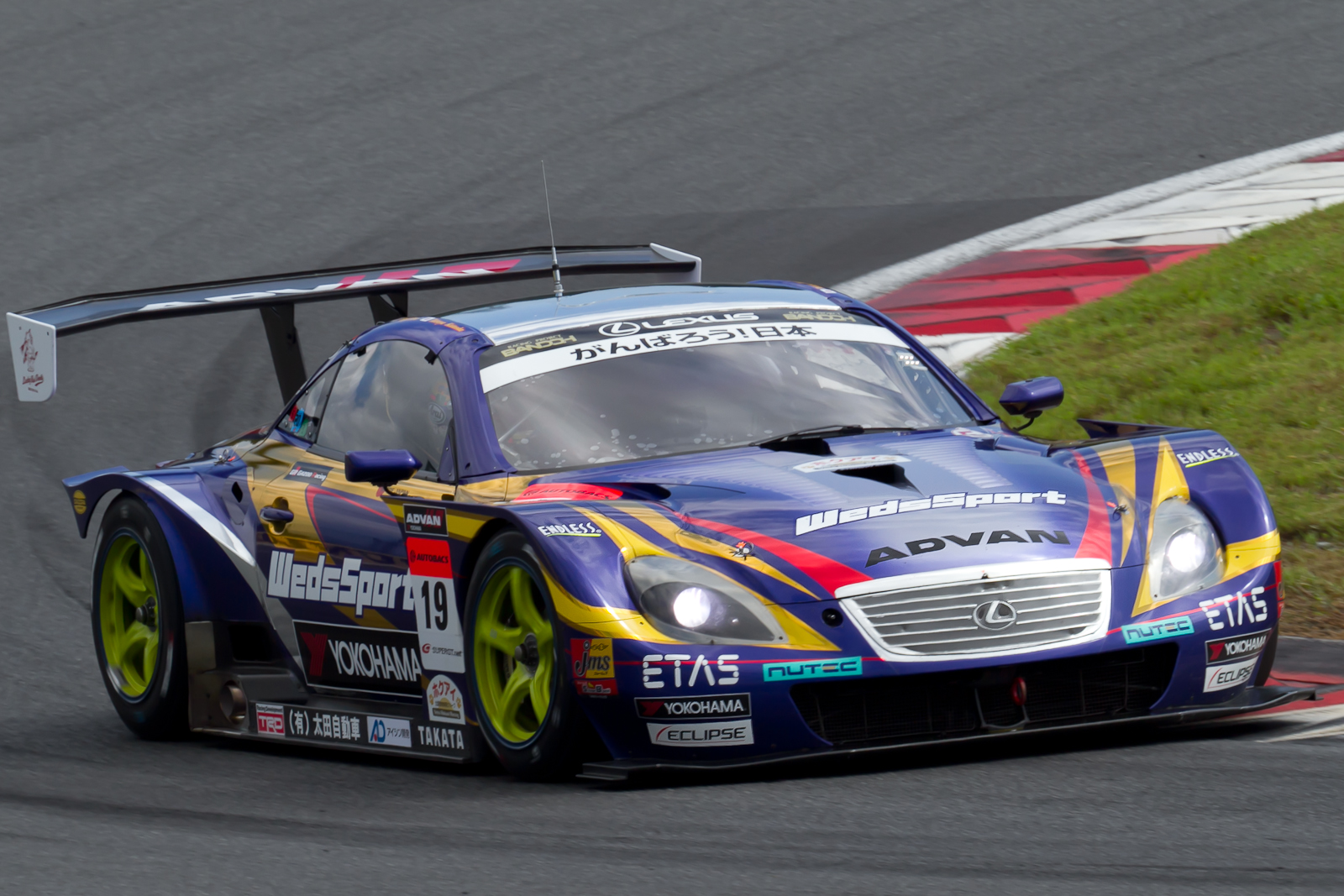 Super GT 2011 Rd.6 Fuji GT 250km: Tatsuya Kataoka (Lexus Team WedsSport Bandoh) driving the Lexus SC GT500.